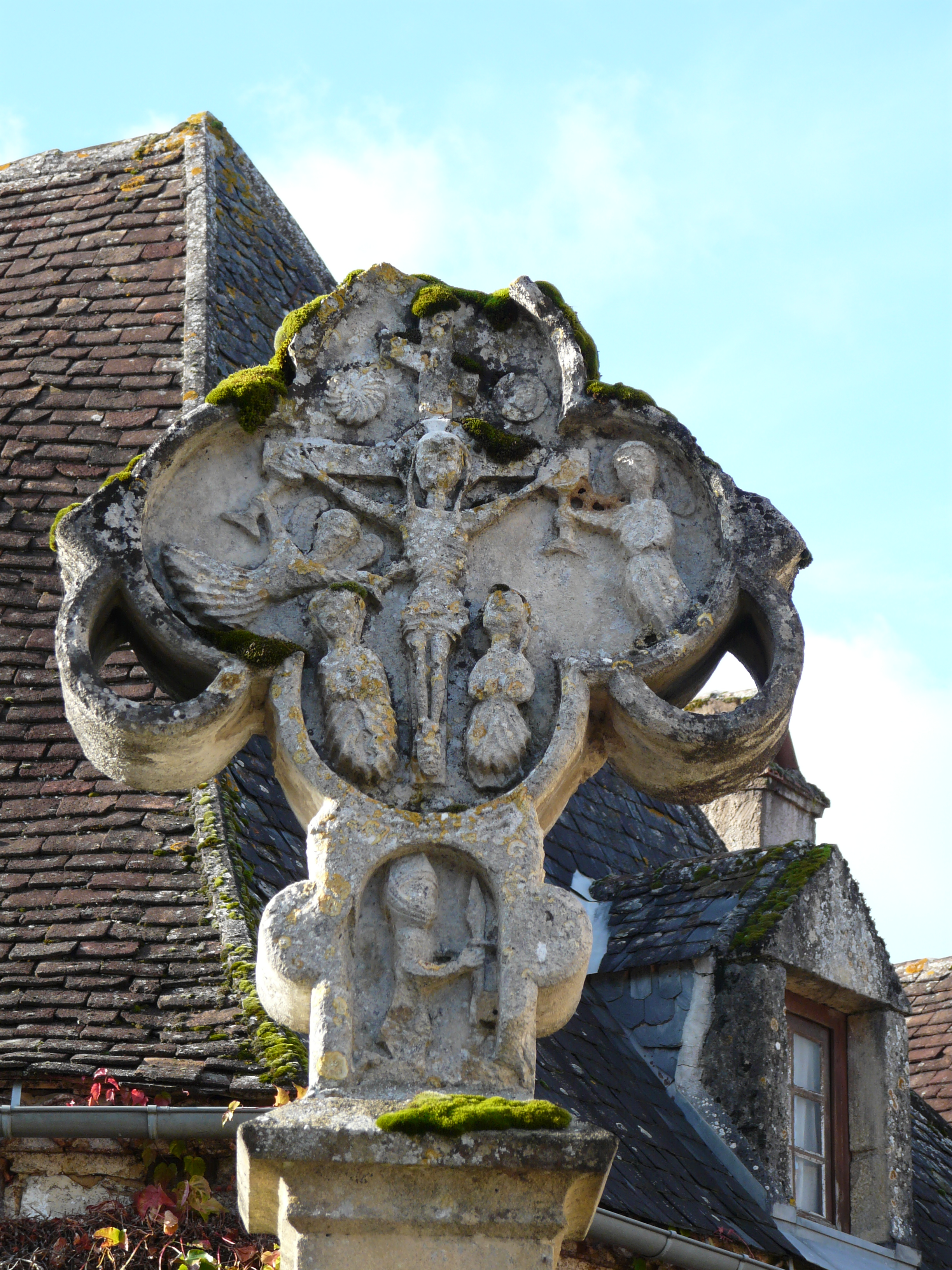 Croix sculptée dans le village de Fanlac, Dordogne, France.